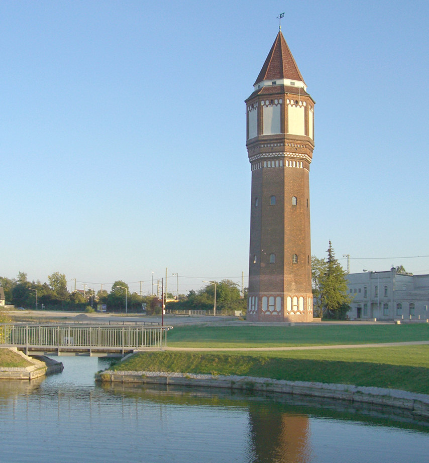 Alter Wasserturm Lehrte am Rande des neu angelegten Stadtparks mit Wasserfläche. Er wurde 1912 von der Firma Robert Grastorf GmbH aus Hannover-Wülfel errichtet, misst vom Boden bis zur Spitze des Daches (ohne Wetterfahne) 44,57 Meter und fasst 250 Kubikmeter Wasser. Im Frühjahr 2003 ging der Turm außer Betrieb.